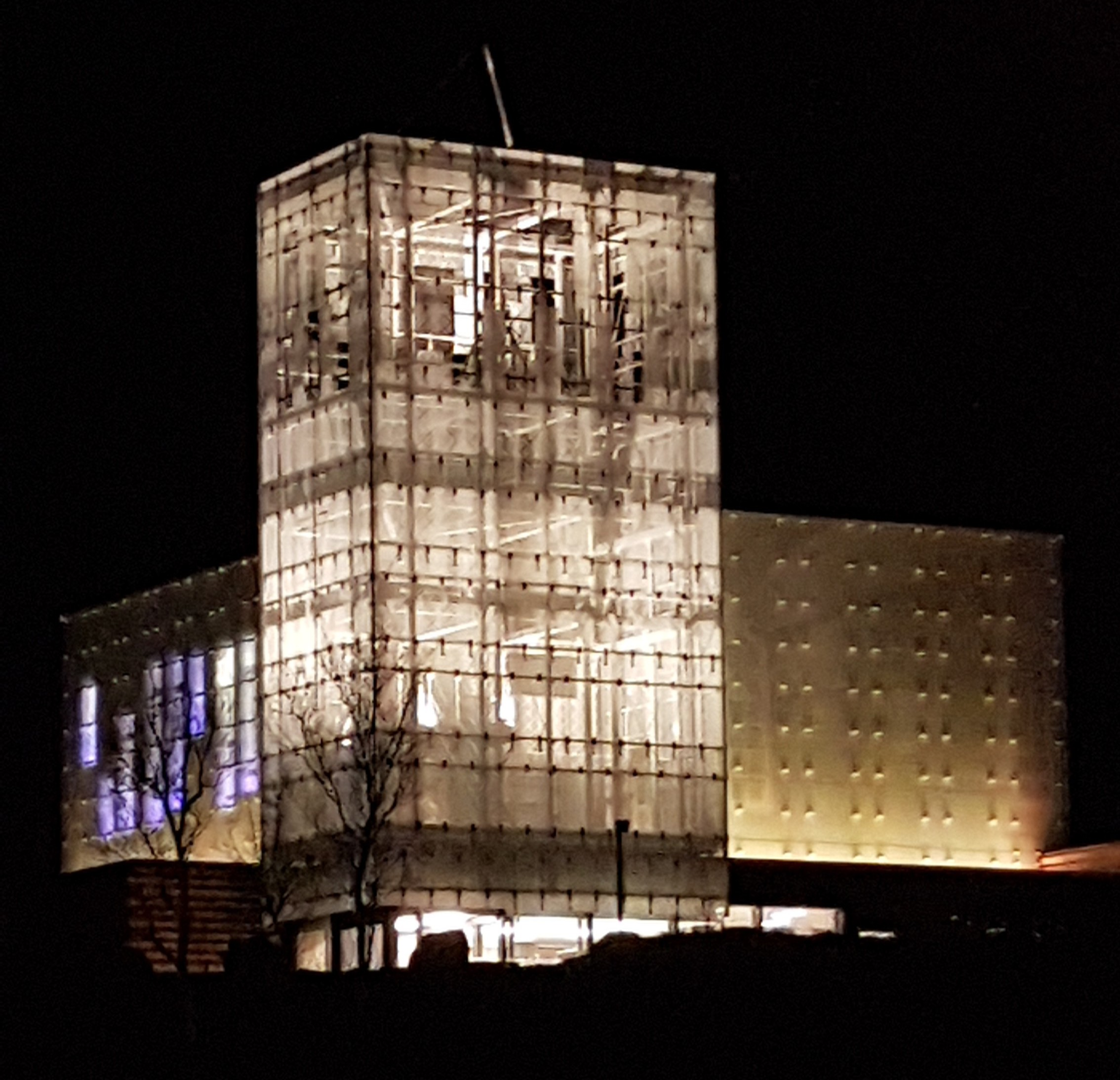 Ny kirke i Rørvik, etter at den gamle kirken brant. Den nye ble vigslet i 2019. Arkitekter: Pir II Arkitekter AS og Hartmann Prosjektrådgiving as